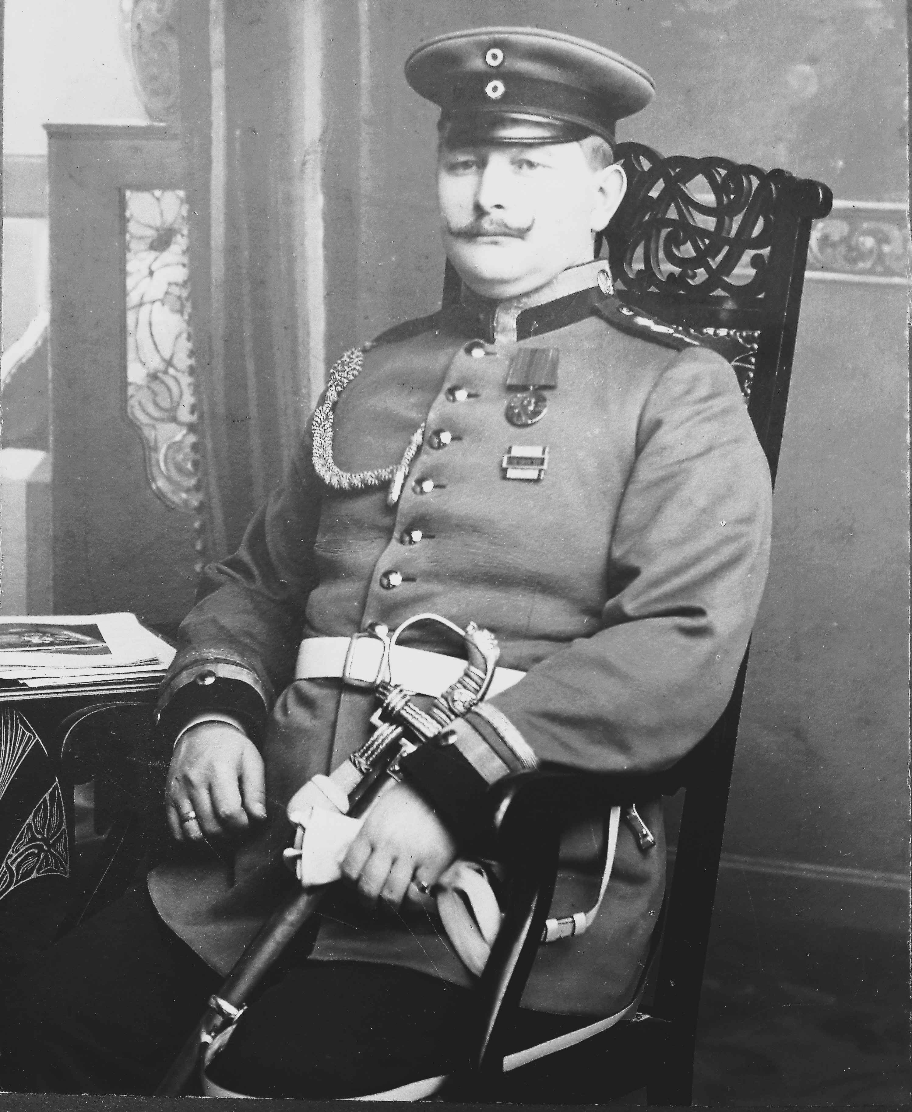 Portrait eines Wachtmeisters des Feldartillerie-Regiment General-Feldzeugmeister (1. Brandenburgisches) Nr. 3, ca. 1900